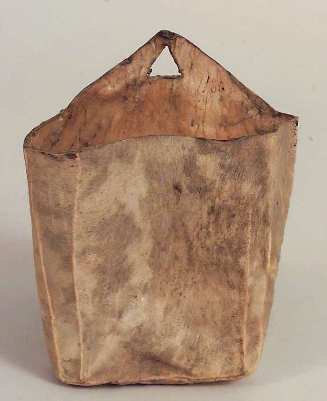 Saltpose i skinn fra Nordland. Høyde 14,5 cm. Foto Anne-Lise Reinsfelt / Norsk Folkemuseum. NF.1923-0255.